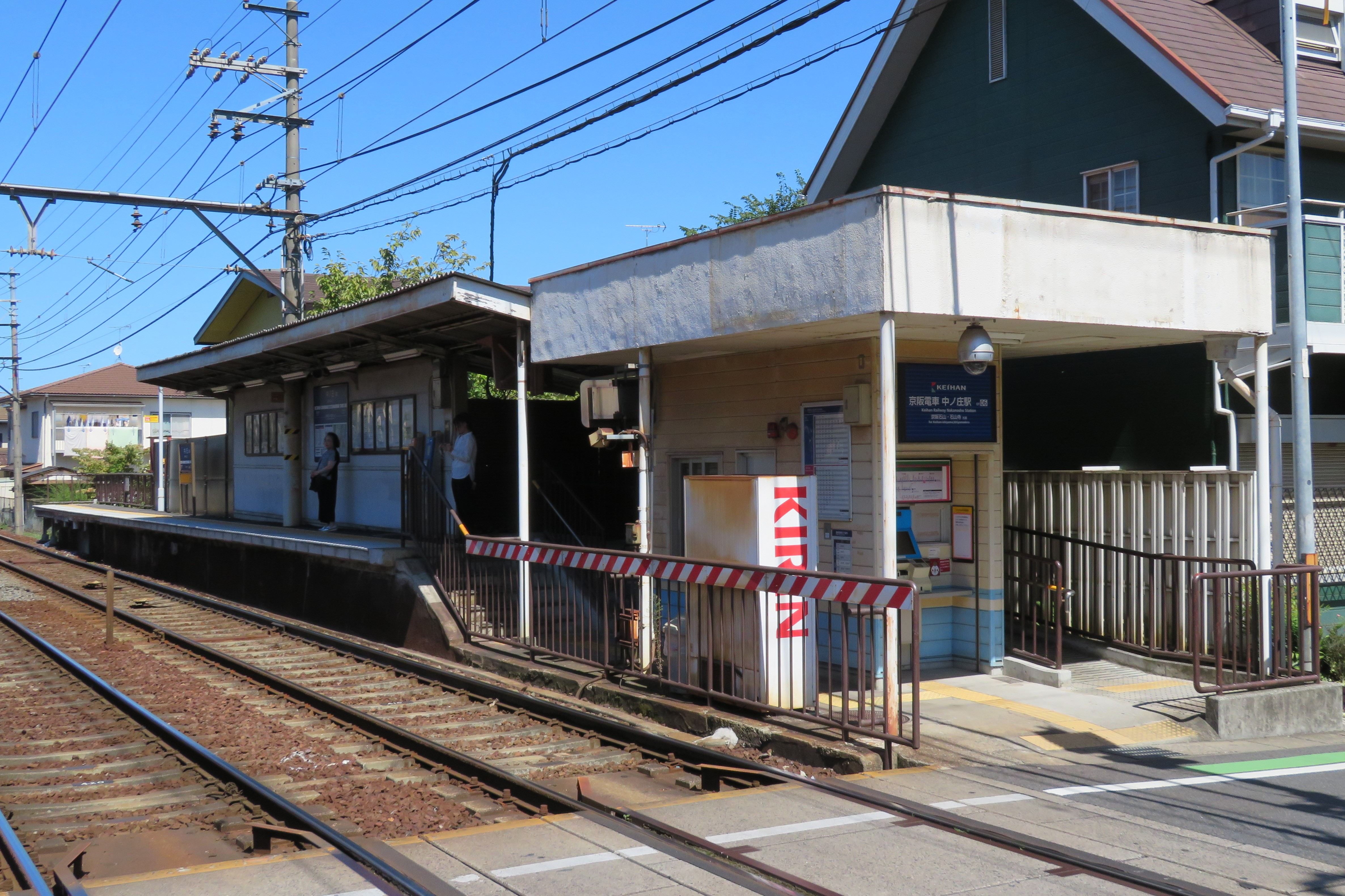 京阪電鉄中ノ庄駅